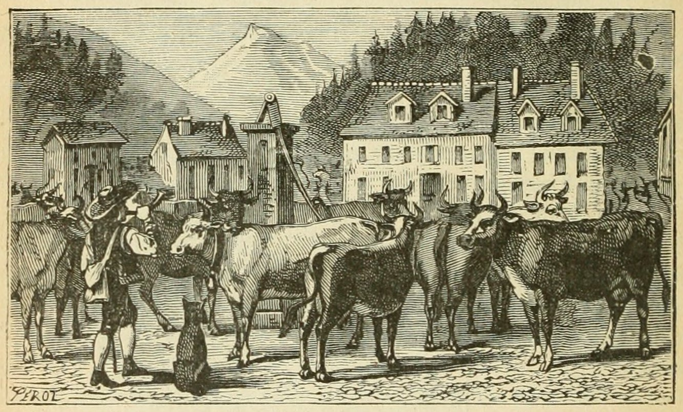 Le tour de la France par deux enfants, par George Bruno, manuel scolaire, édition de 1904